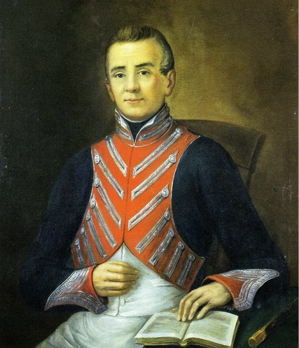 Retrato del militar español Mariano Gil de Bernabé (1767-1812). Se conserva en la Academia de Artillería de Segovia.